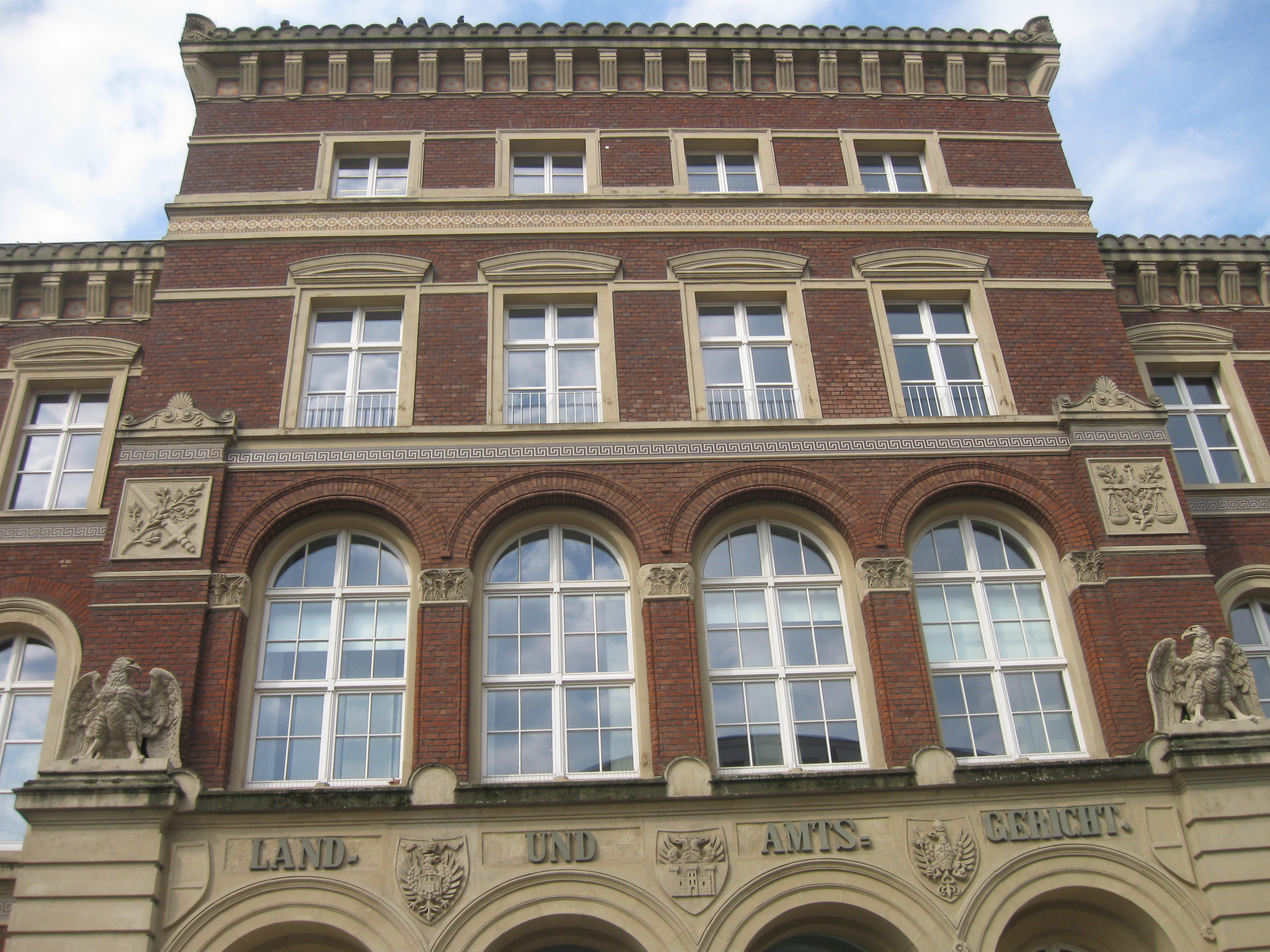 Tribunal Regional de Duisburgo (Alemania)